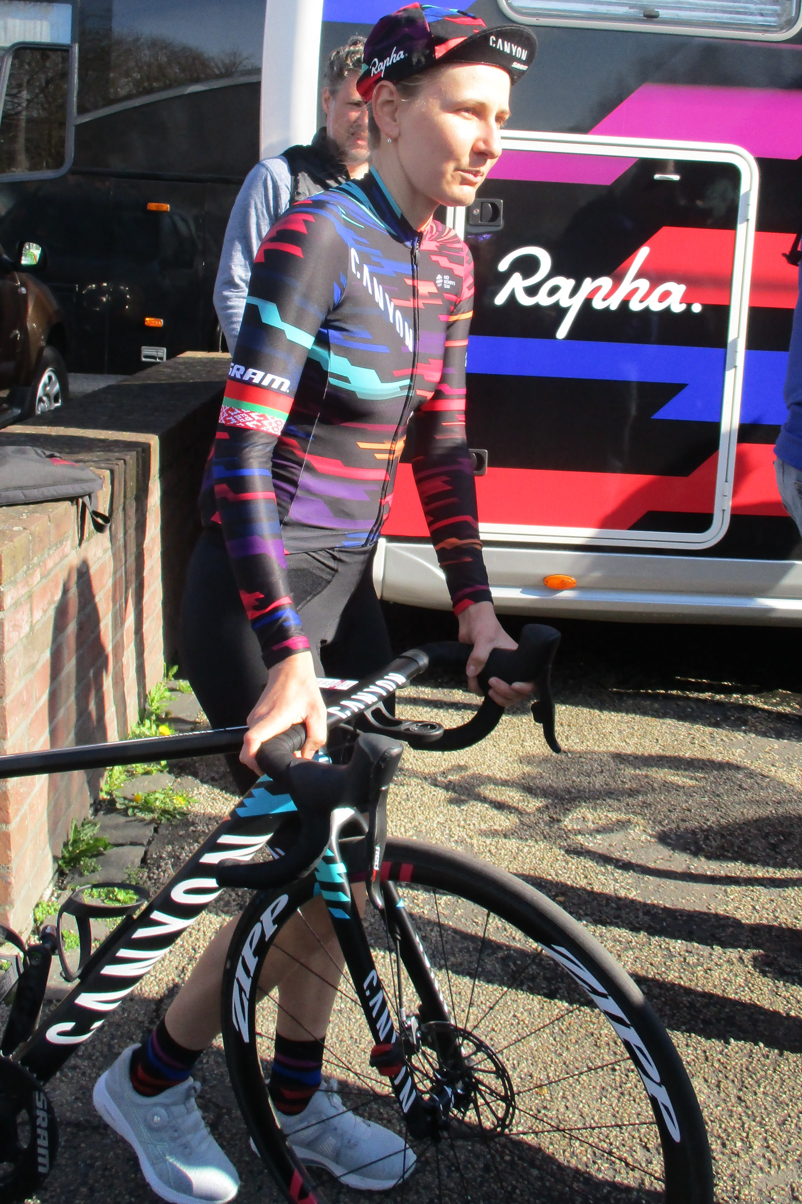 Start van de Amstel Gold Race Ladies Edition 2018 in Maastricht.